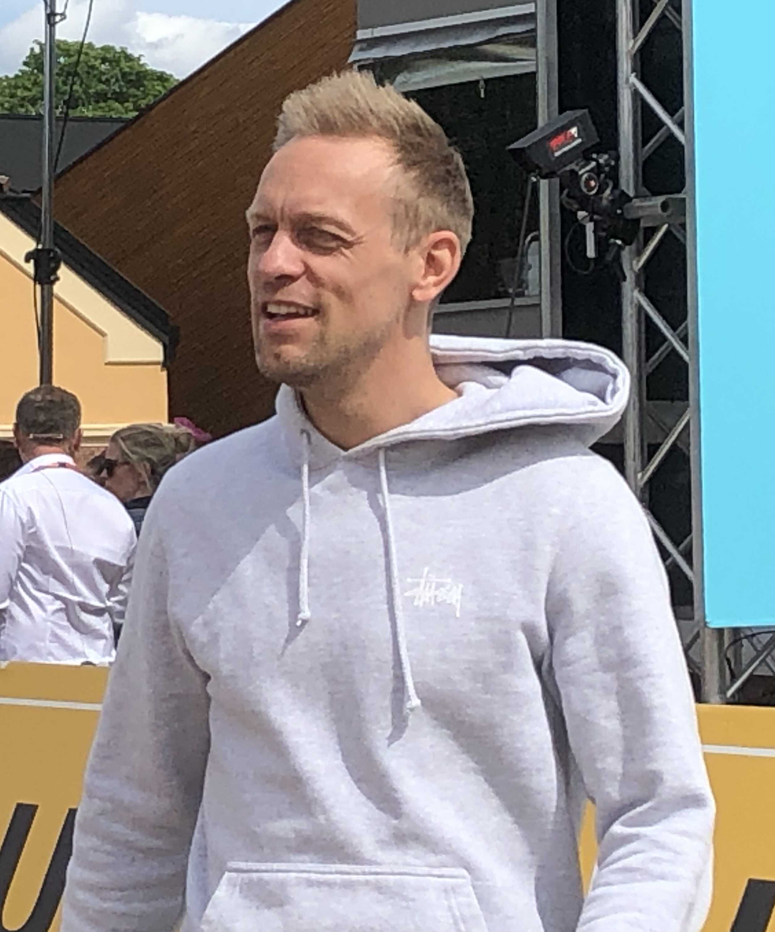 Mads Hansen lager show på brua i Hønefoss under Tour de Norway 2019.